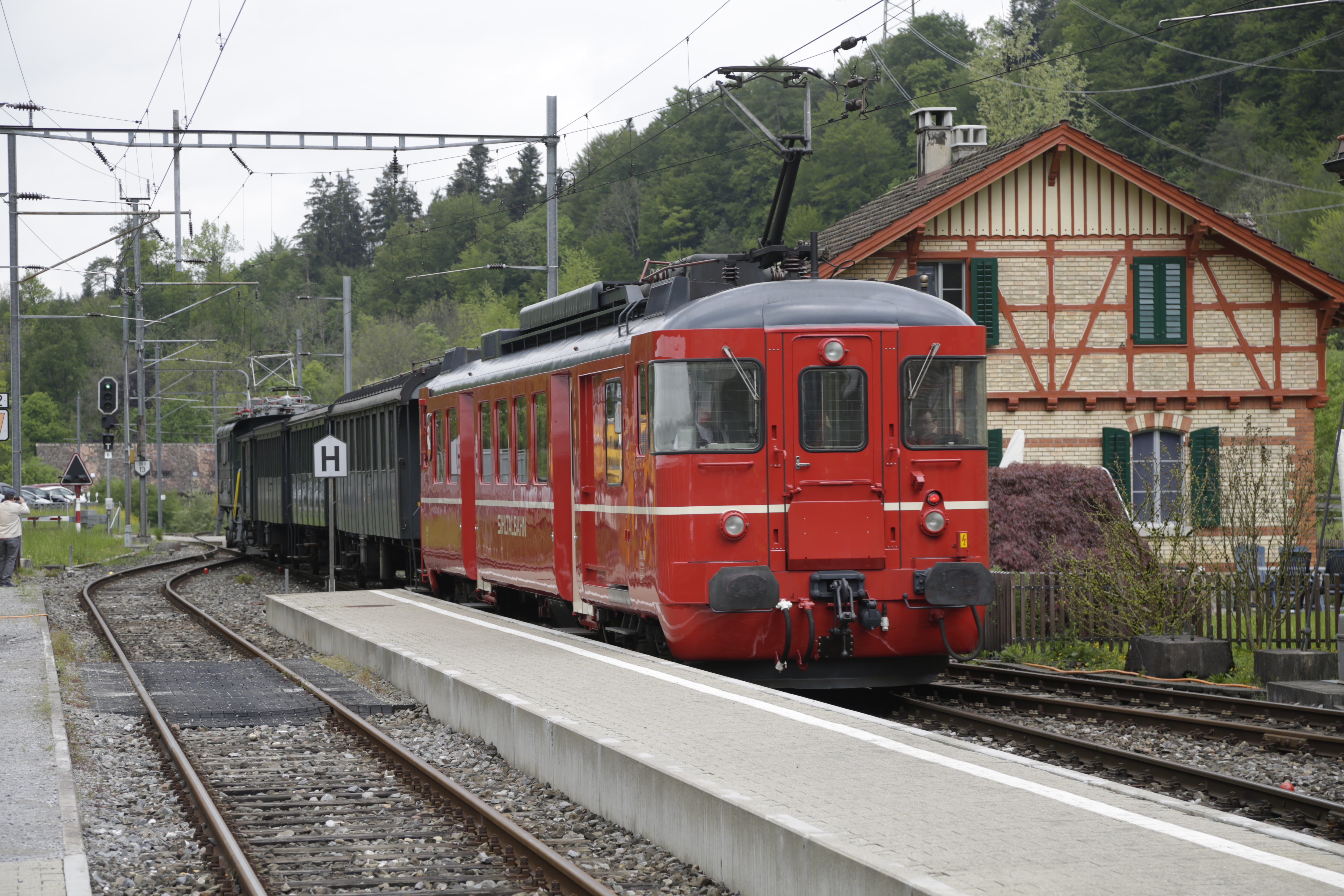 Der BDe 4/4 Nummer 92 der Sihltalbahn im Bahnhof Sihlwald.